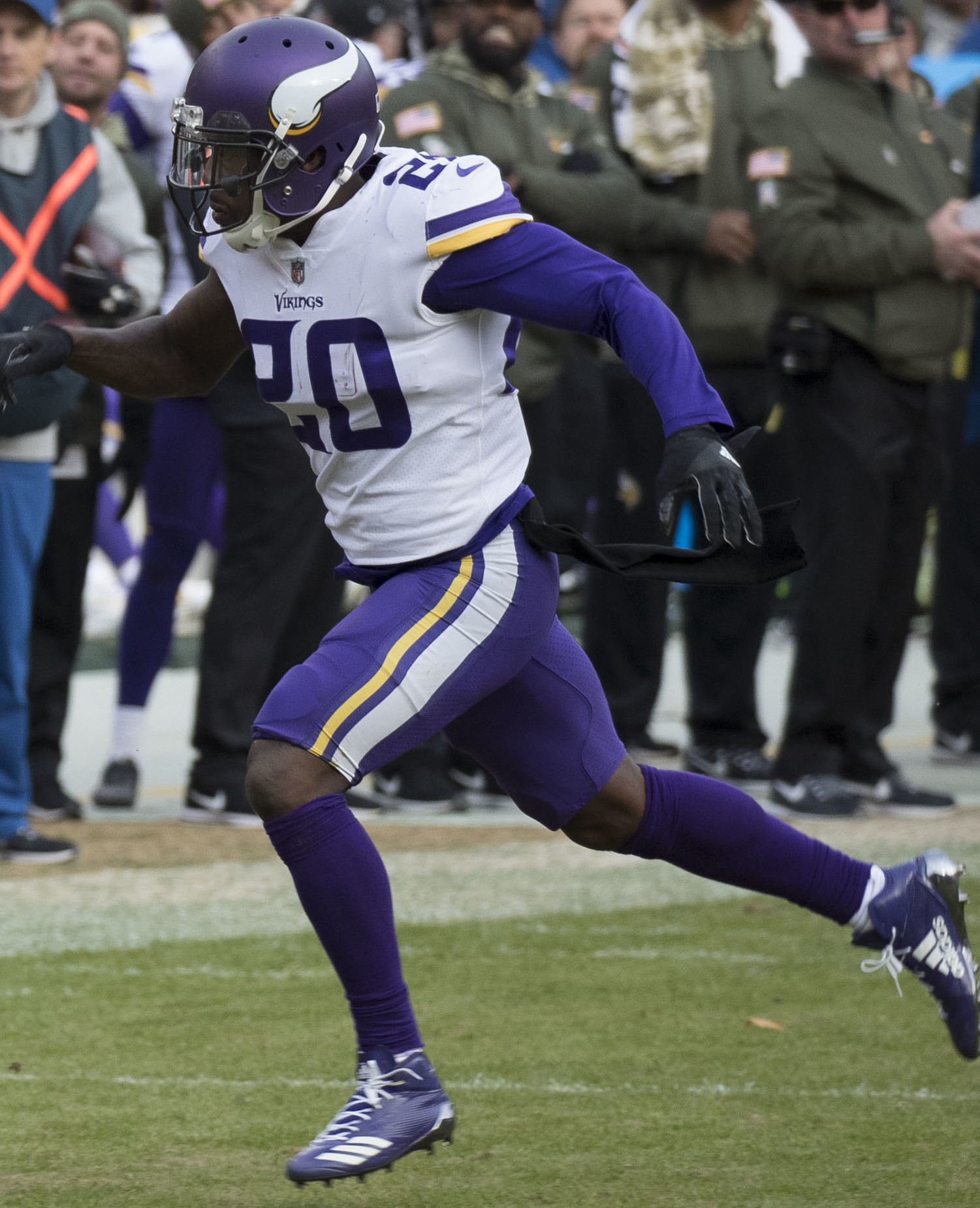 Vikings at Redskins 11/12/17